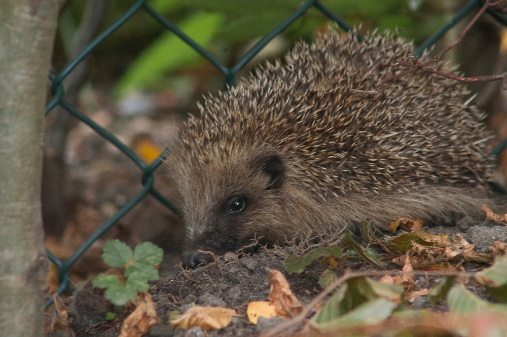 egel tussenbladeren in de tuin hedgehog among leaves in garden